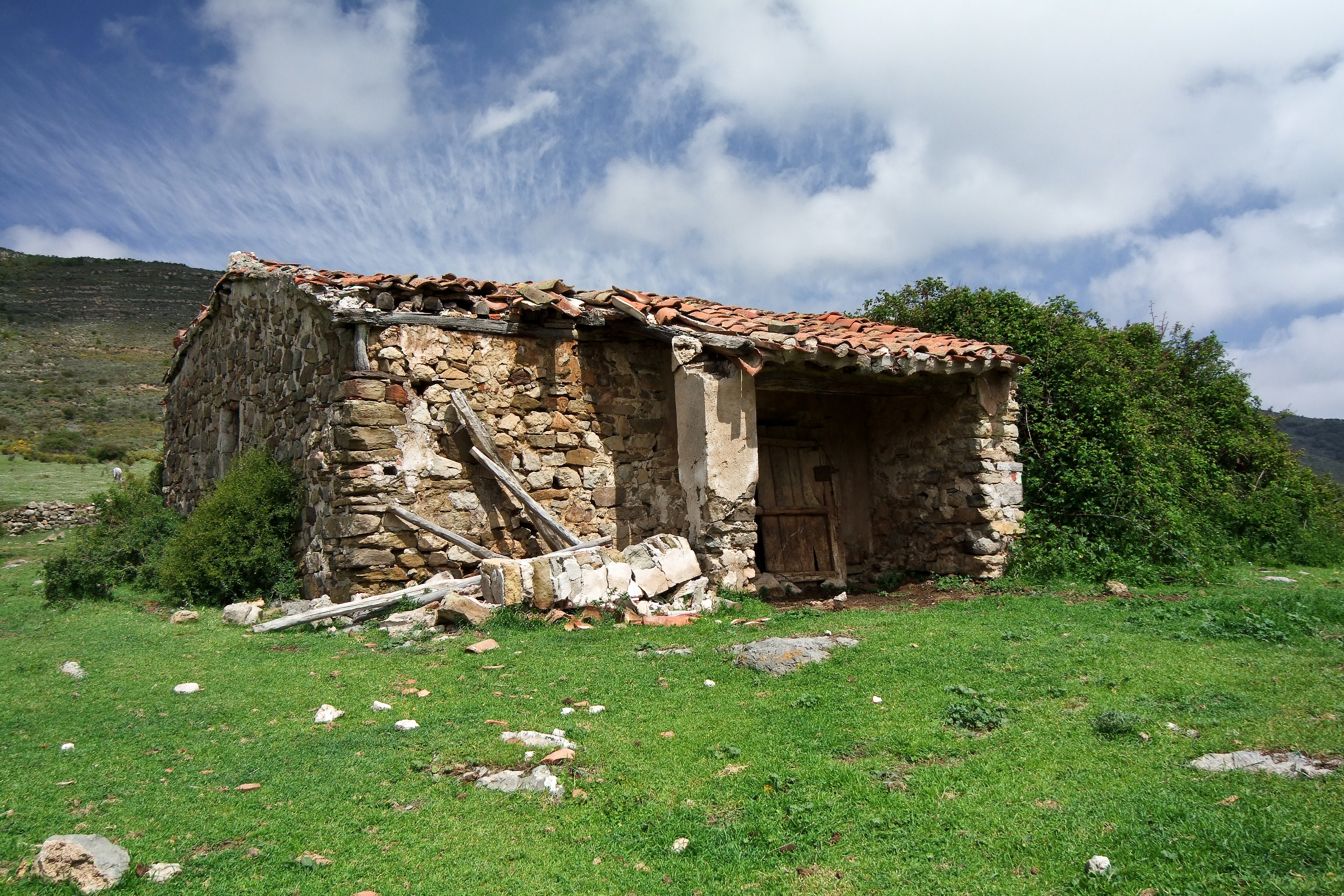 Ermita de Santa Marina en la localidad de Santa Cecilia, La Rioja - España